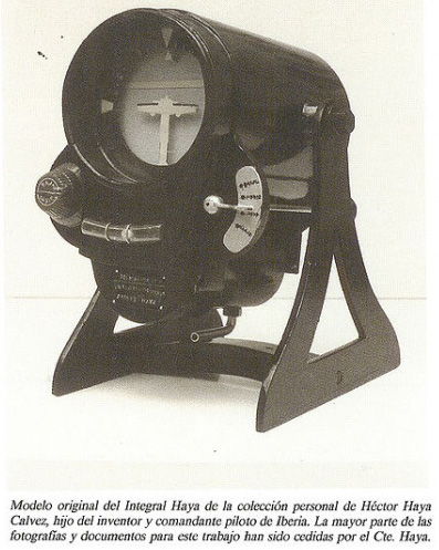 Integral Haya, fotografía cedida por familia de Haya tal y como indica el pie de foto.